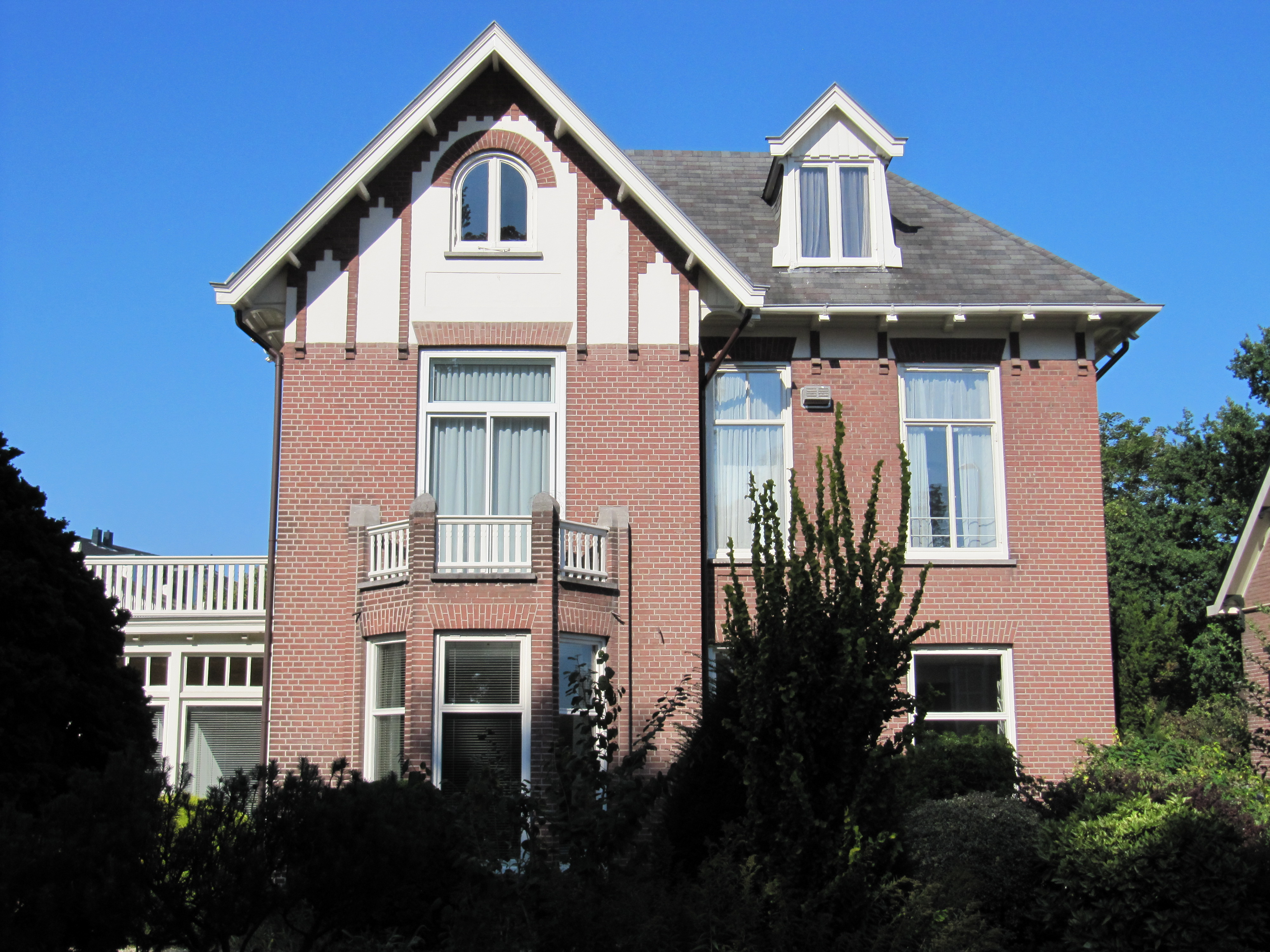 Ds van Dijkweg 13 Doetinchem